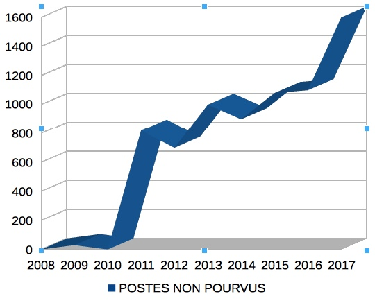 Recrutement CAPES, Postes non pourvus de 2008 à 2017